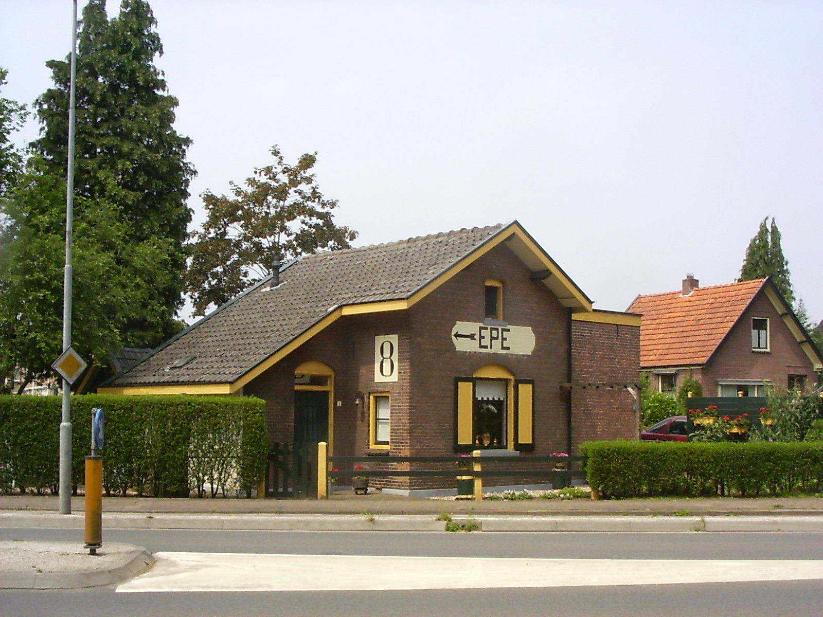 Baanwachtershuis van Epe